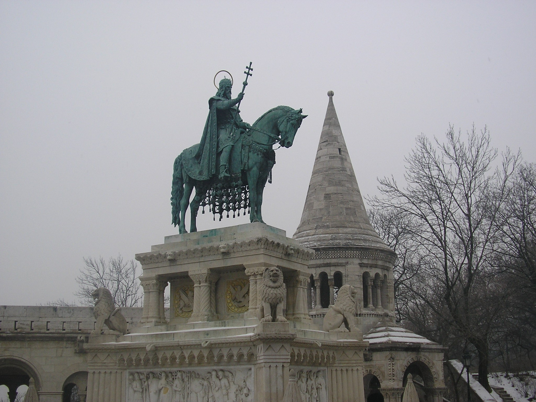 Saint Stephen. פיסלו של מלך הונגריה סטפן הקדוש, ממצודת הדייגים בבודפשט.